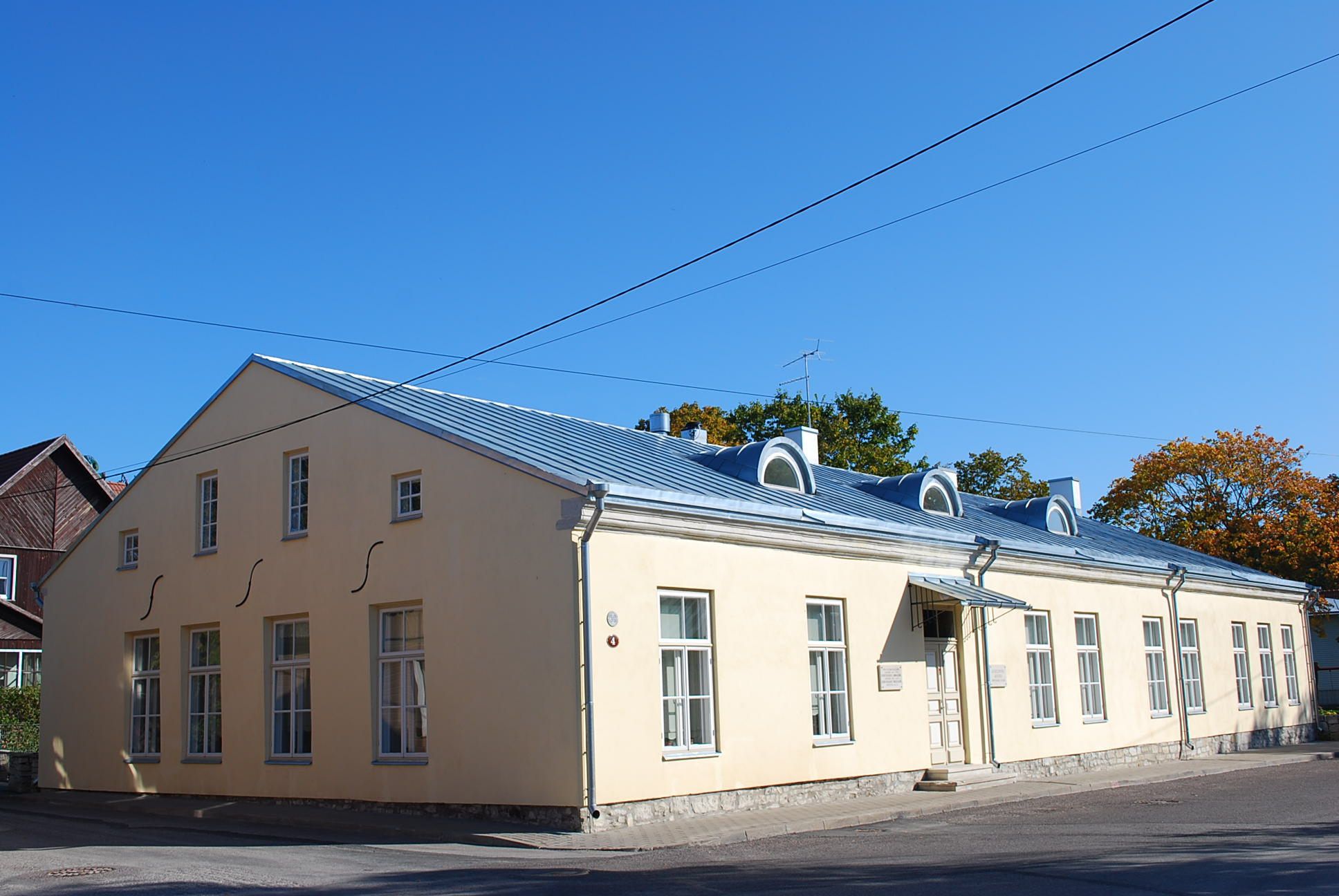 Kuressaare linnakooli hoone